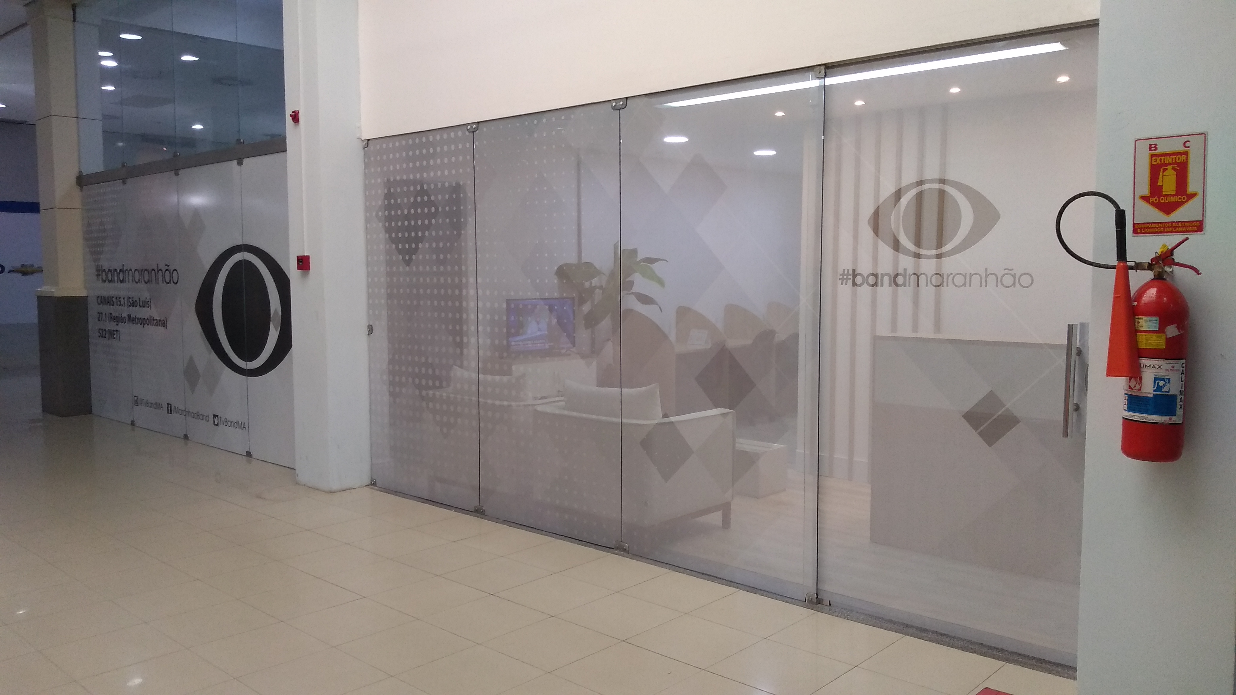 Sede da Band Maranhão, emissora de televisão sediada em São Luís, MA - Brasil, no interior do Jaracaty Shopping